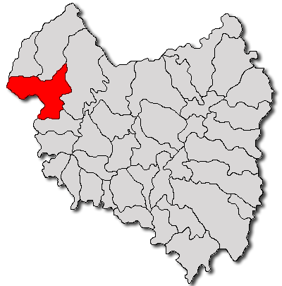 Categorie:Hărţi ale judeţului Covasna